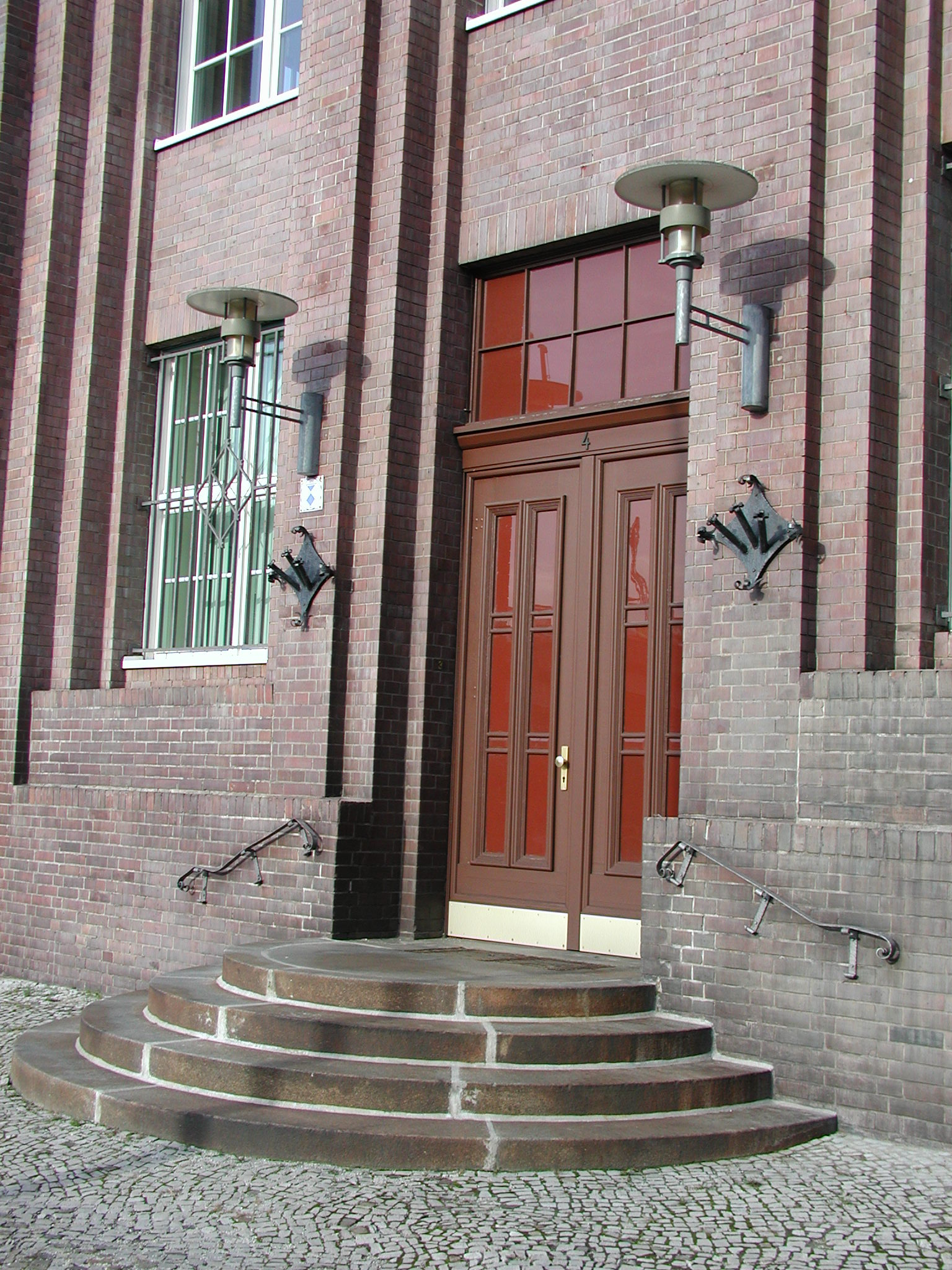 Eingang am westlichen Turm des Verwaltungsgebäudes der Knorr-Bremse